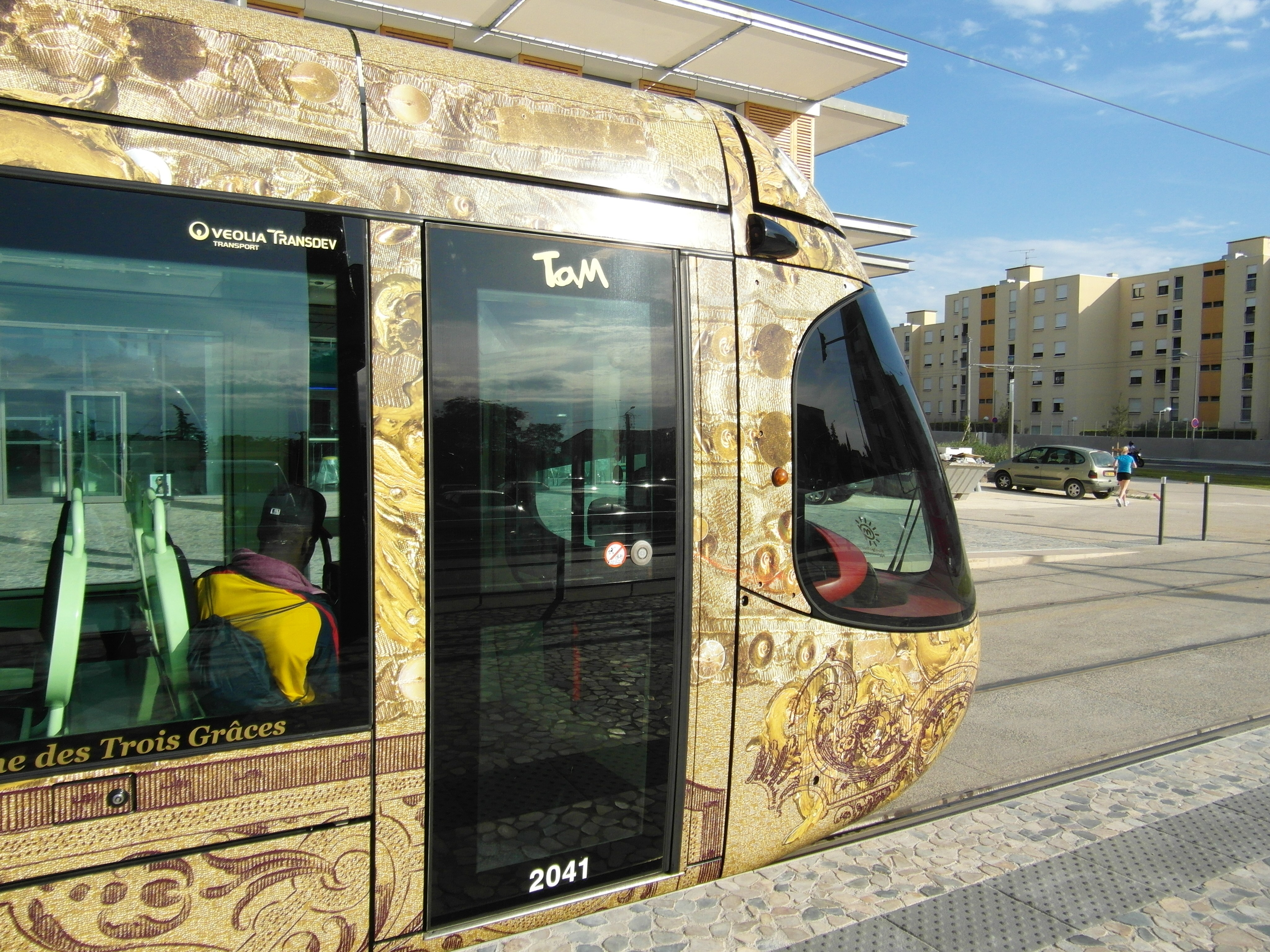 Details der Straßenbahnfahrzeuge der Linie 4